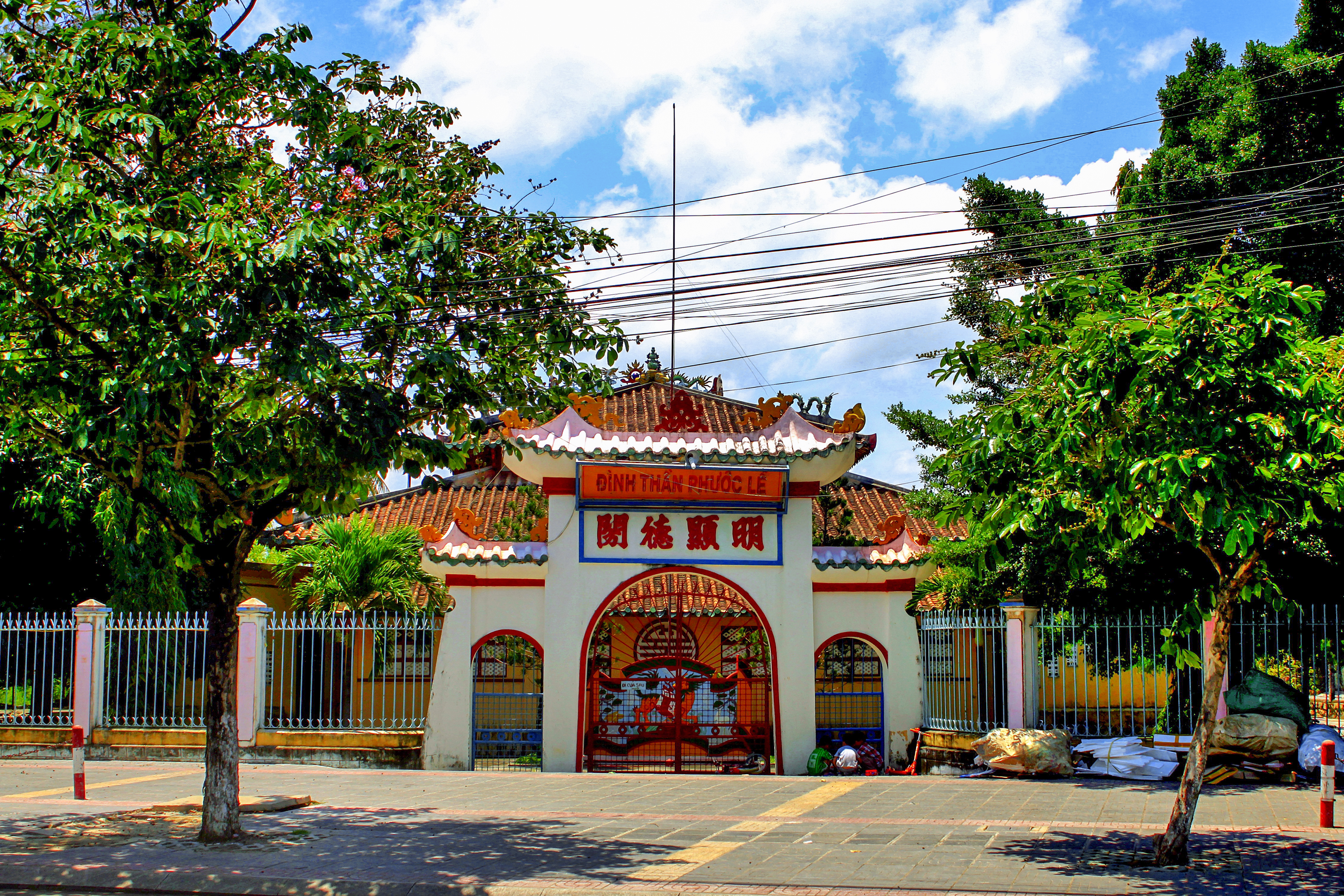 Đình thần Phước Lễ ở phường Phước Trung, TP Bà Rịa, tỉnh Bà Rịa-Vũng Tàu, Việt Nam. Ngôi đình đã có cách nay khoảng trên 200 năm, và thờ danh sĩ Nguyễn Thiếp (1723 - 1804), làm thần Thành hoàng làng.